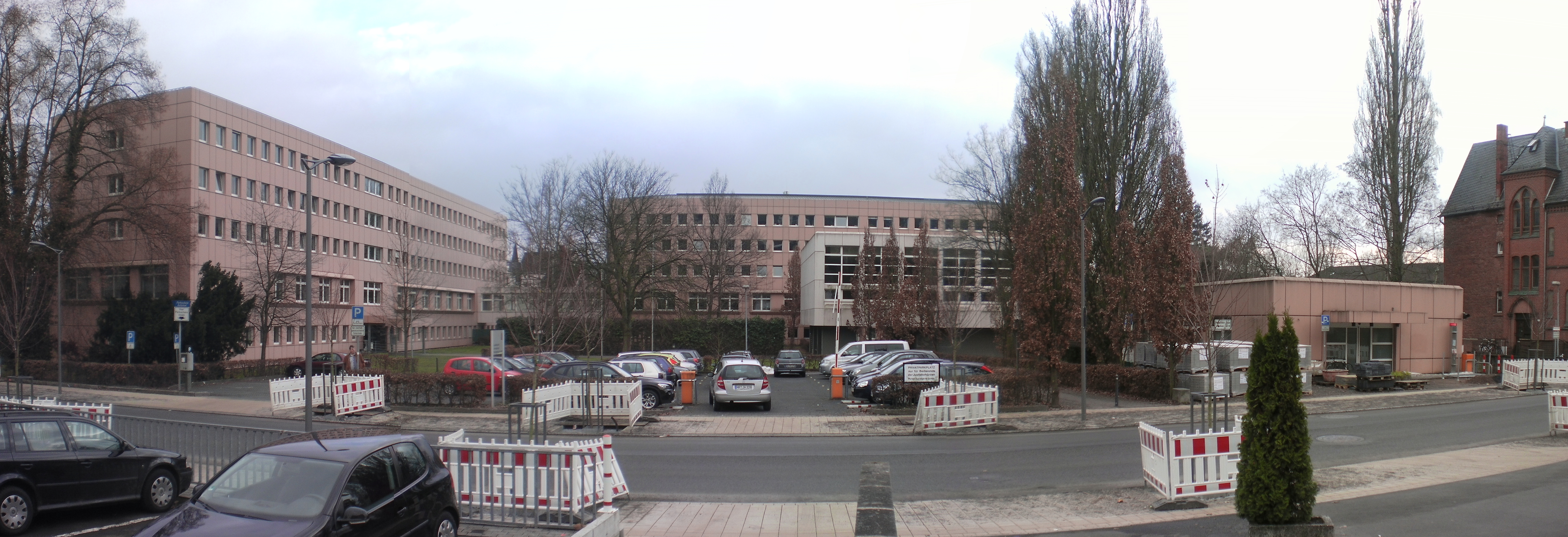 Gemeinsamer Gebäudekomplex des Amtsgerichts und des Landgerichts in Marburg